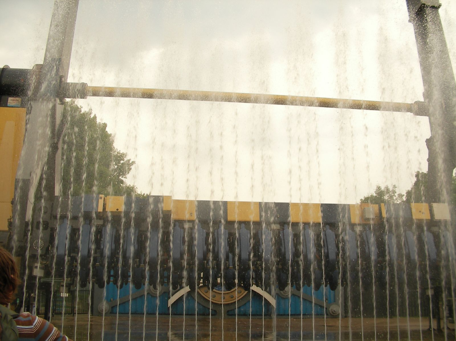 Cliffhanger at Wonderland